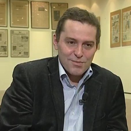 Cezary Gmyz, dziennikarz.